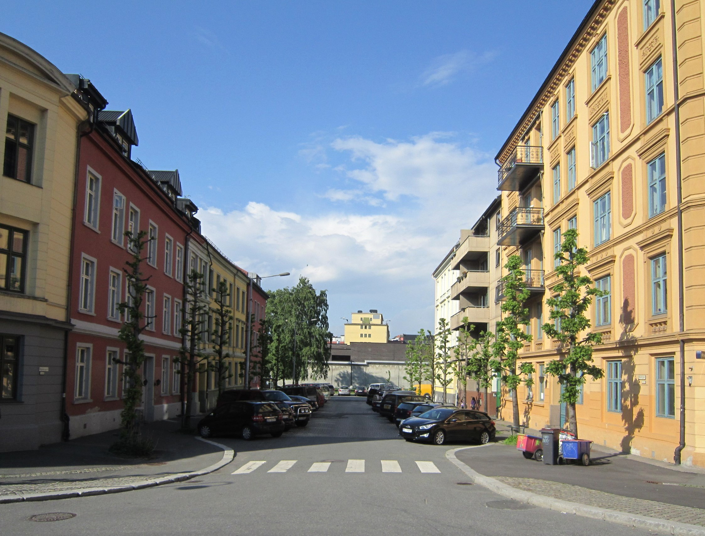 Klostergata (Gamlebyen i Oslo) nord for Schweigaards gate